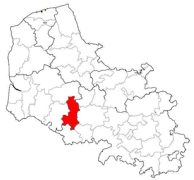 Localisation de la CCCT dans le Pas-de-Calais.